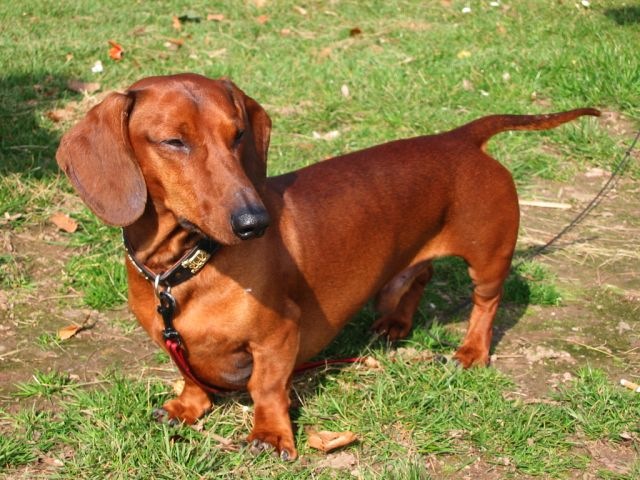 Ein Riesenkurzhaardackel